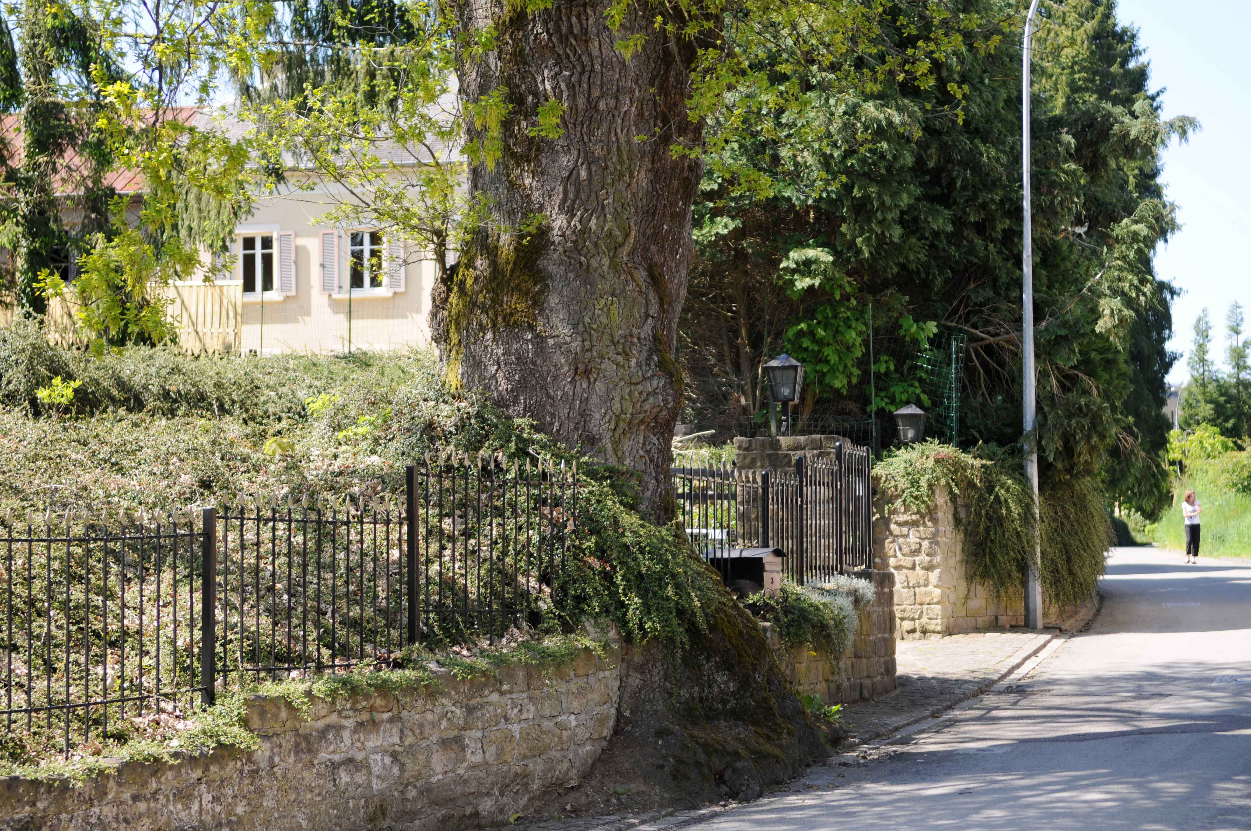 Kategorie:Gemeng Jonglënster + Kategorie:Bemierkenswäert Beem zu Lëtzebuerg